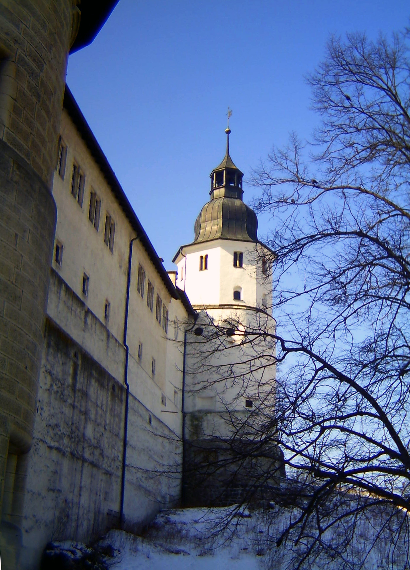 Hellenstein Castle, Heidenheim